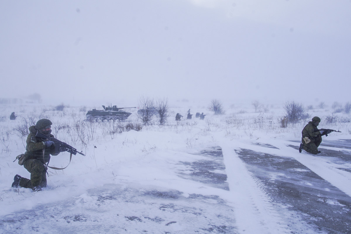 Тактическое учение с подразделениями 247-го гвардейского десантно-штурмового Кавказского казачьего полка в Ставропольском крае.